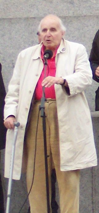 Walter Wolfgang